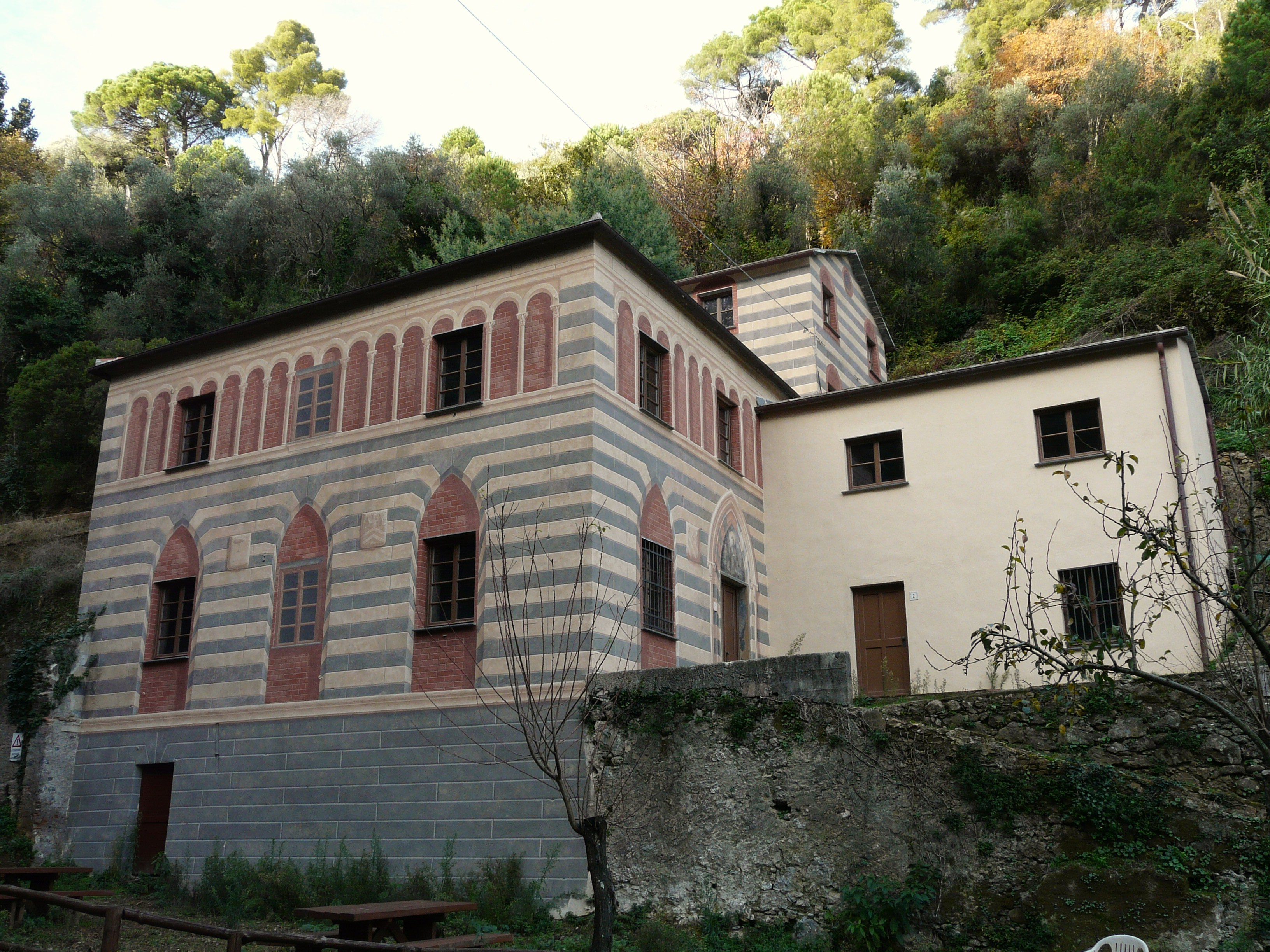 Eremo di Sant'Antonio di Niasca, Portofino, Liguria, Italia